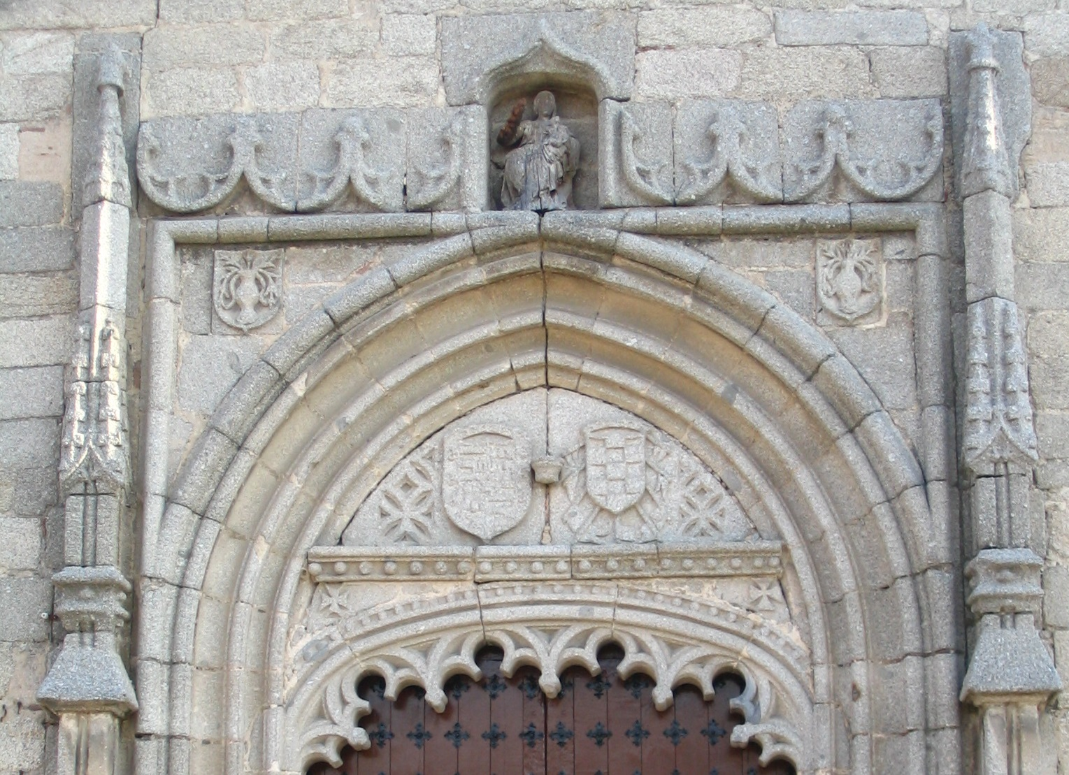 Portada principal de la Iglesia Parroquial de Ntra Sra del Castillo, Macotera. Disinguimos en su tímpano los escudos del segundo Duque de Alba y su esposa.